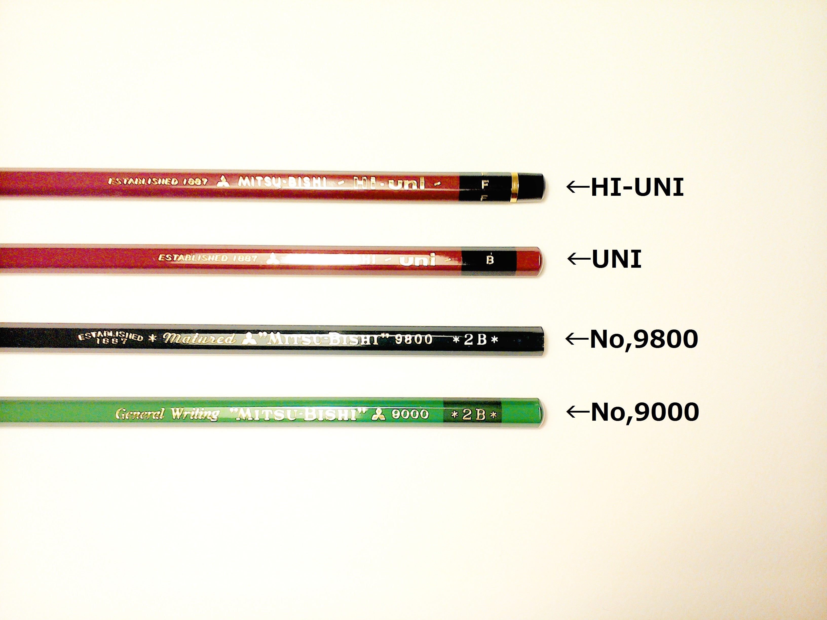 現時点（2018年２月26日）で投稿している三菱製鉛筆をまとめてみました。明度上げ加工・テキスト入力済みです。